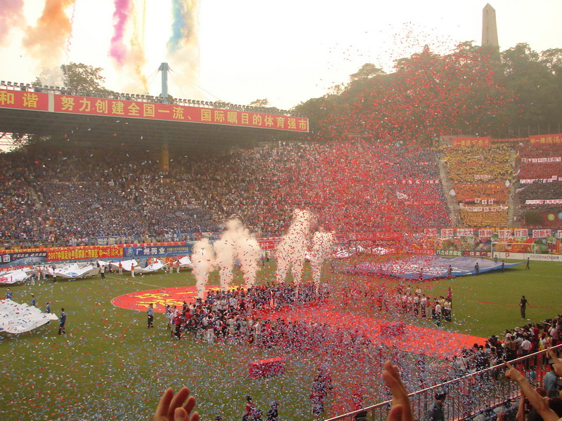 2007年中国足球甲级联赛冠军颁奖仪式